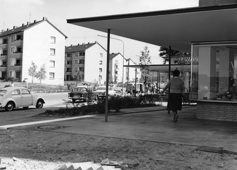 Bielefeld-Sennestadt (Nordrhein-Westfalen)